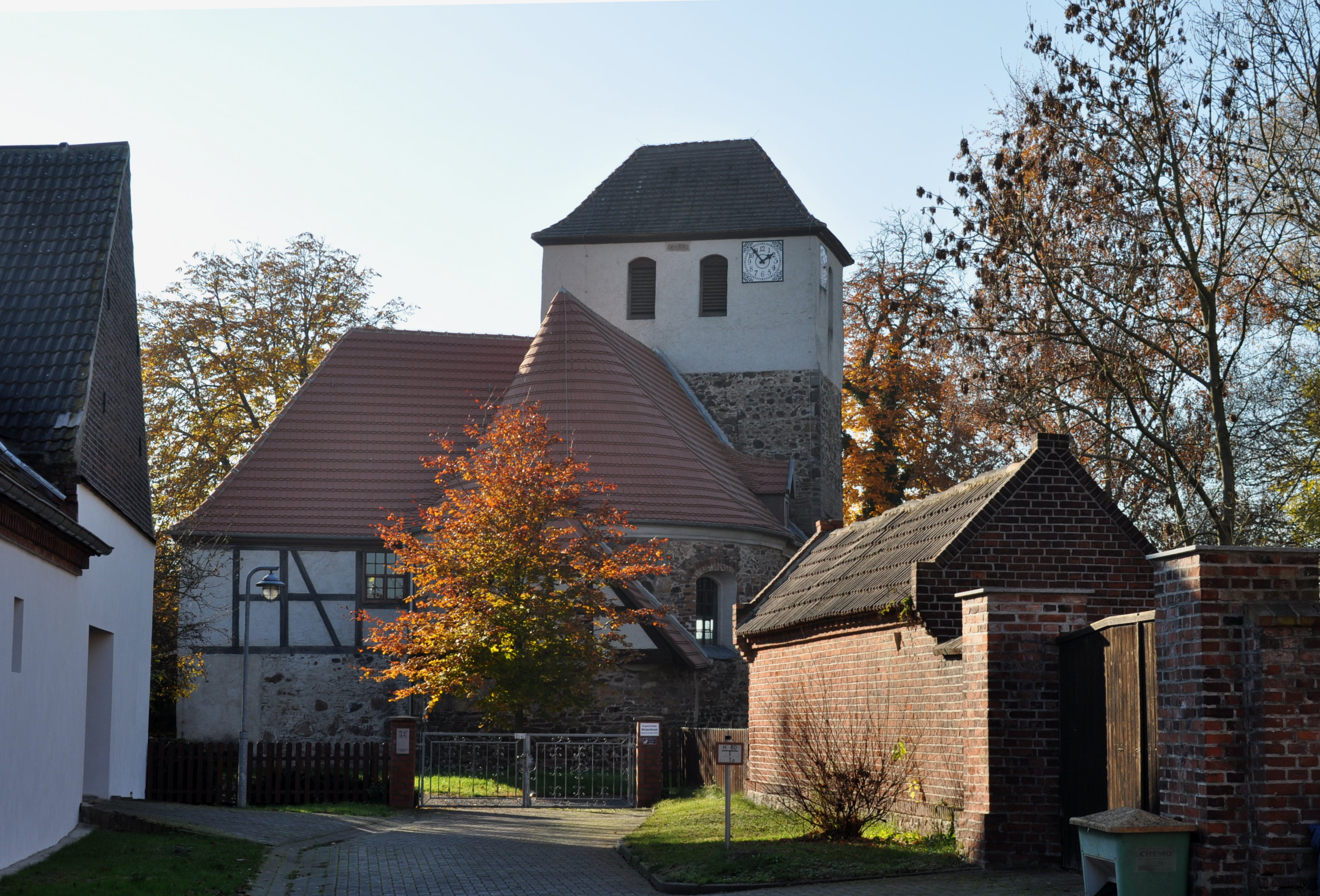 Salzfurtkapelle, Evangelische Kirche